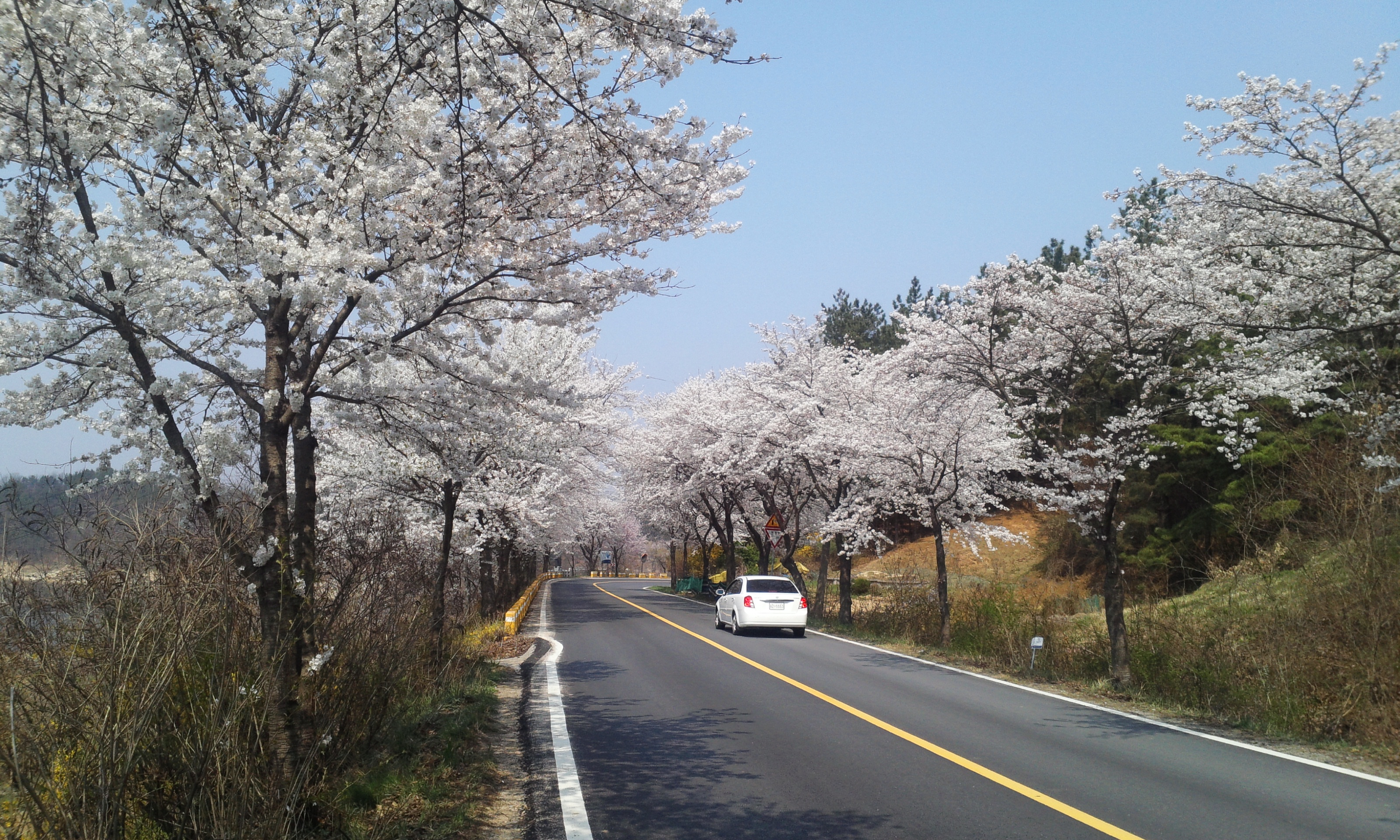 대청호오백리길 5구간